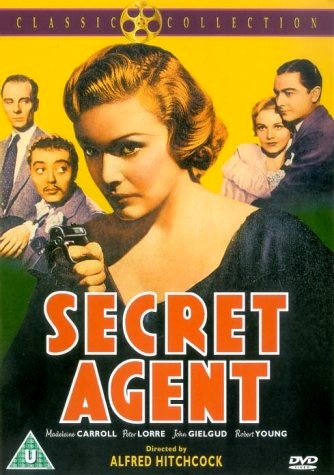 Fotografía del póster de la película de Alfred Hichcock Agente Secreto